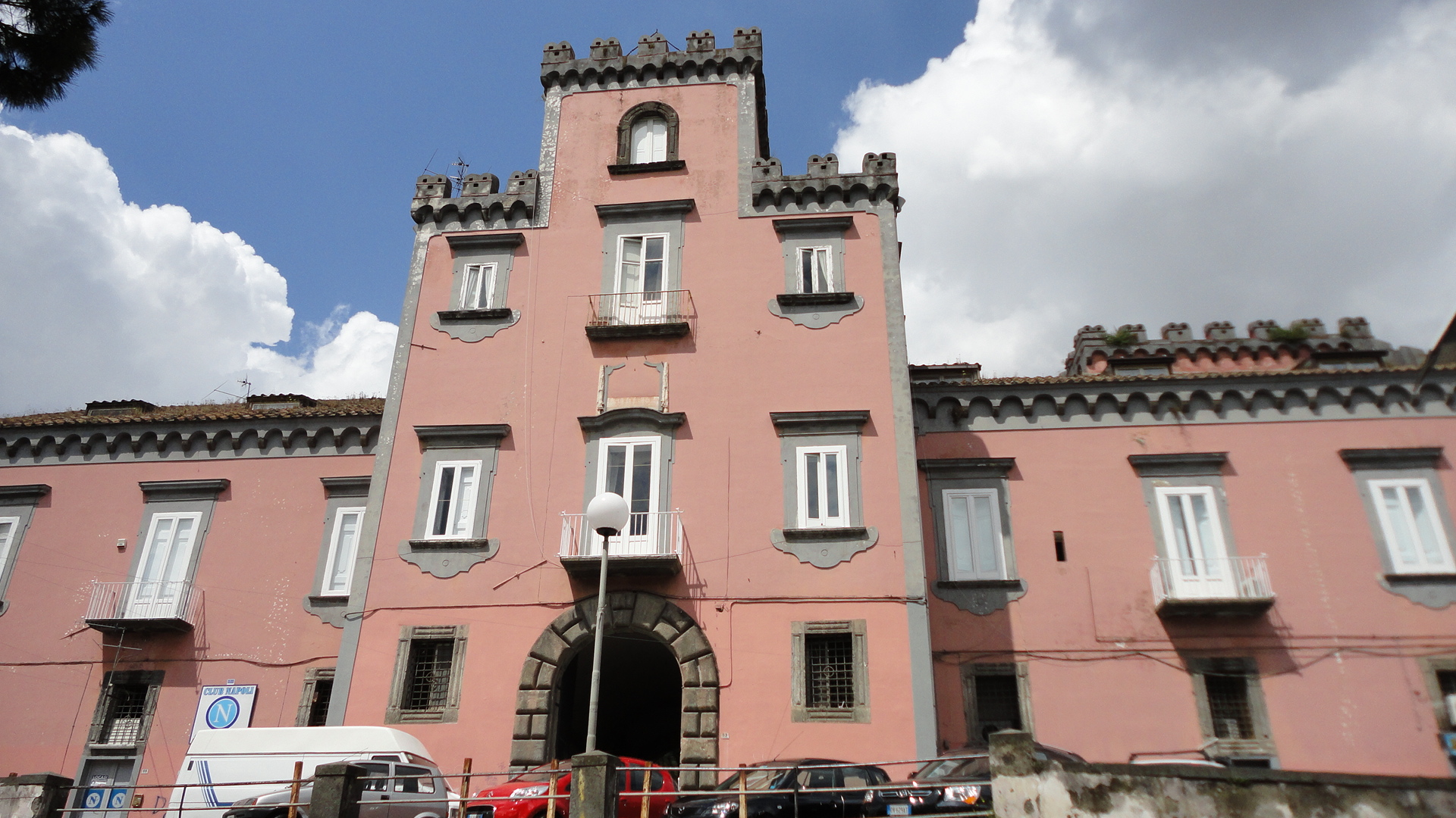 foto scattate, Il Castello Baronale in Sant'Antimo, di probabile origine Normanna, Creative commons, 2010, Agostino Pedata (User:sedicinoni).